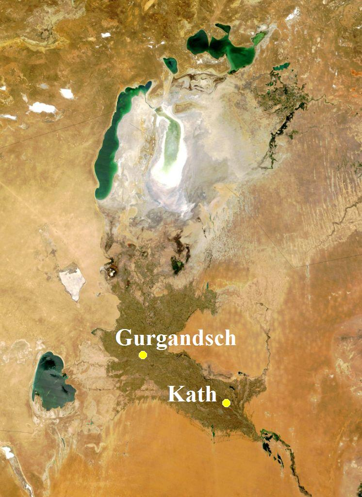 die choresmischen Hauptstädte Kath und Gurgandsch